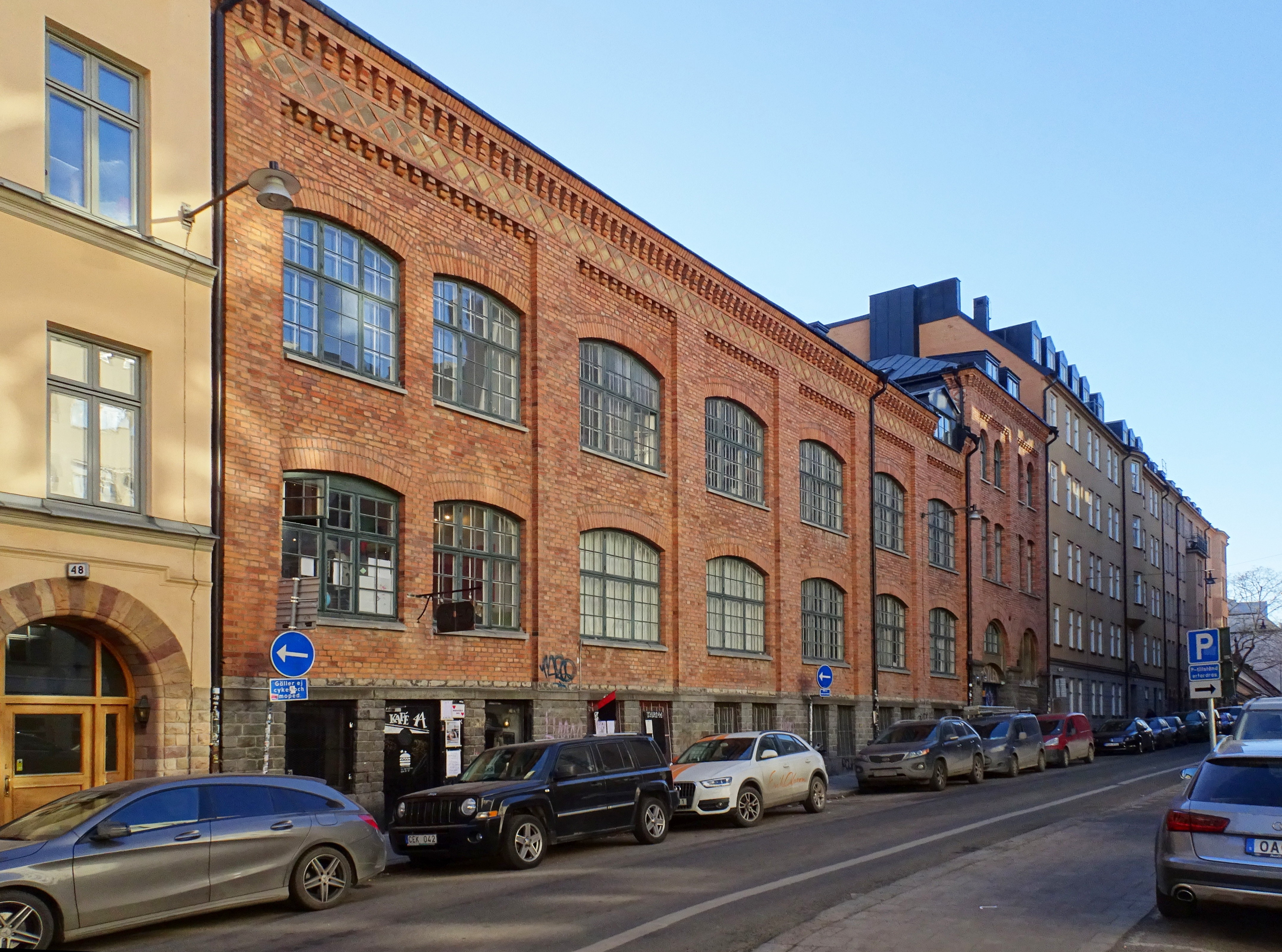 Sveriges kapsylfabrik, fasad mot Tjärhovsgatan